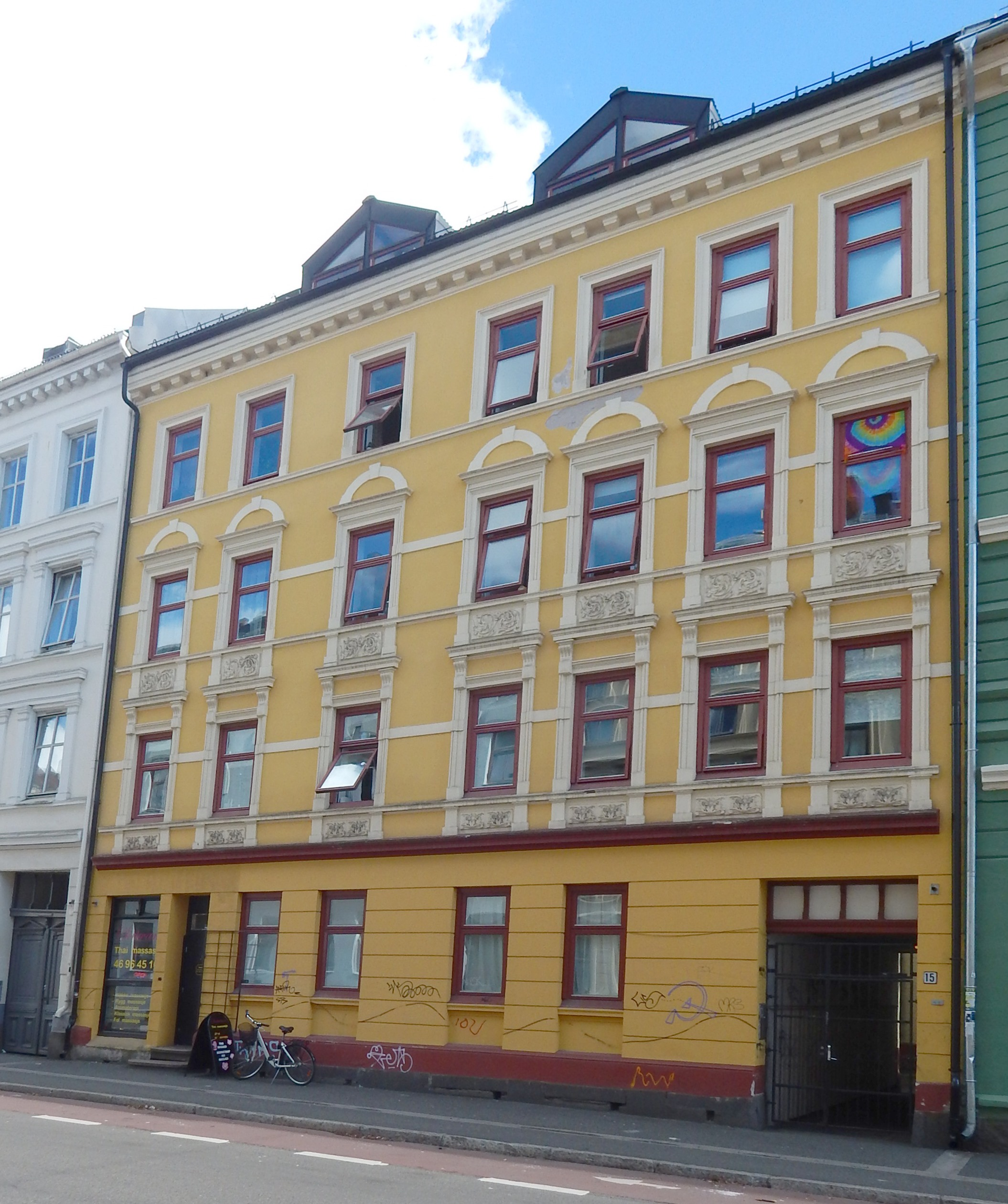 Schleppegrells gate 15. Arkitekt: Ludwig Zapffe (1898). Fredet.